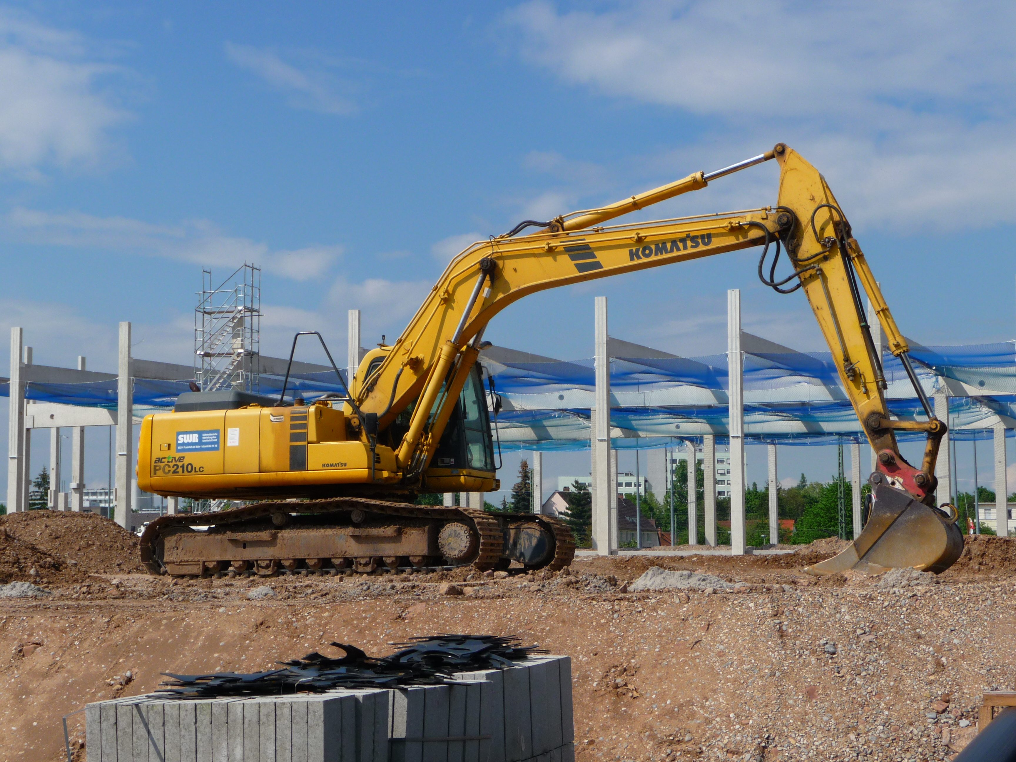 Raupenbagger Komatsu Pc 210 LC, fotografiert auf einer Baustelle im Heidelberger Stadtteil Pfaffengrund (Baden-Württemberg, Deutschland)